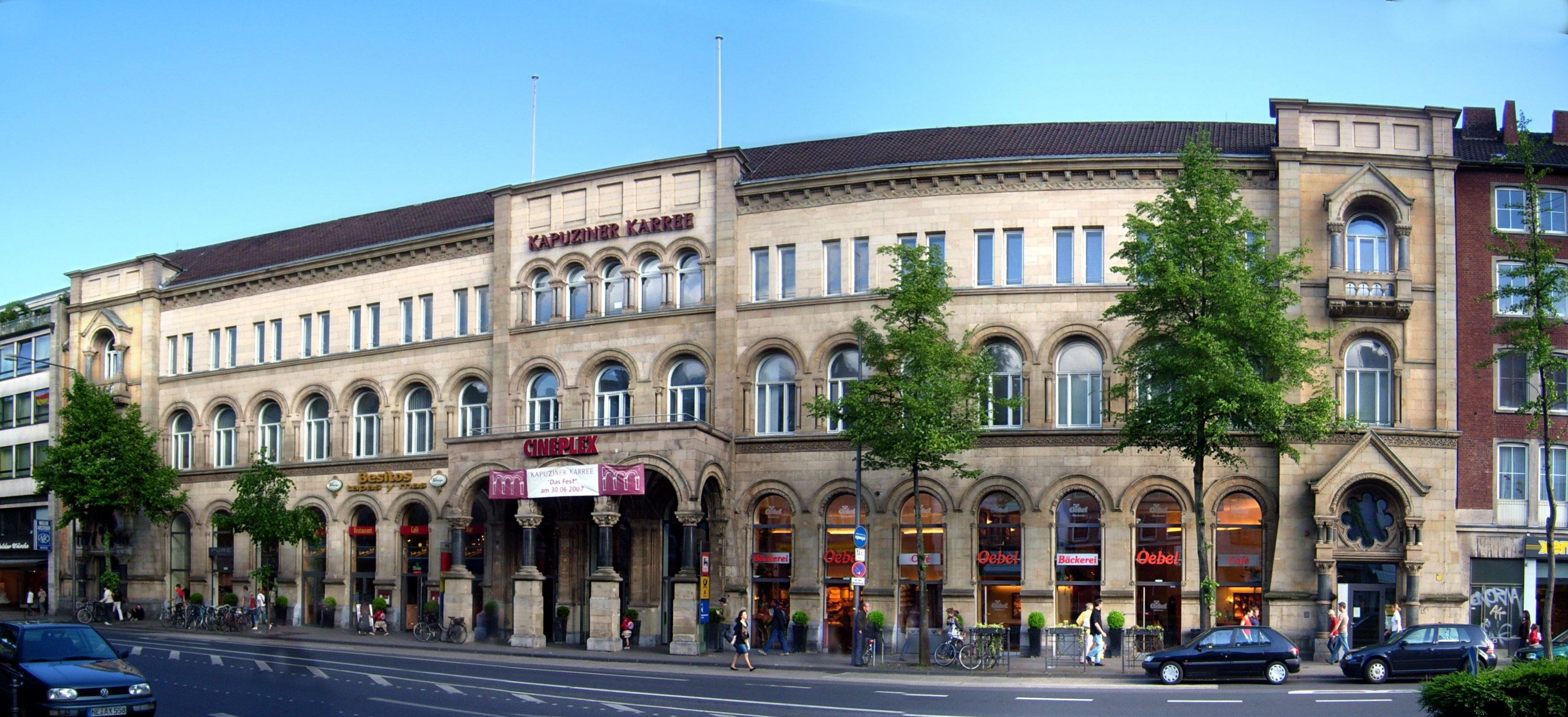 Alte Post in Aachen